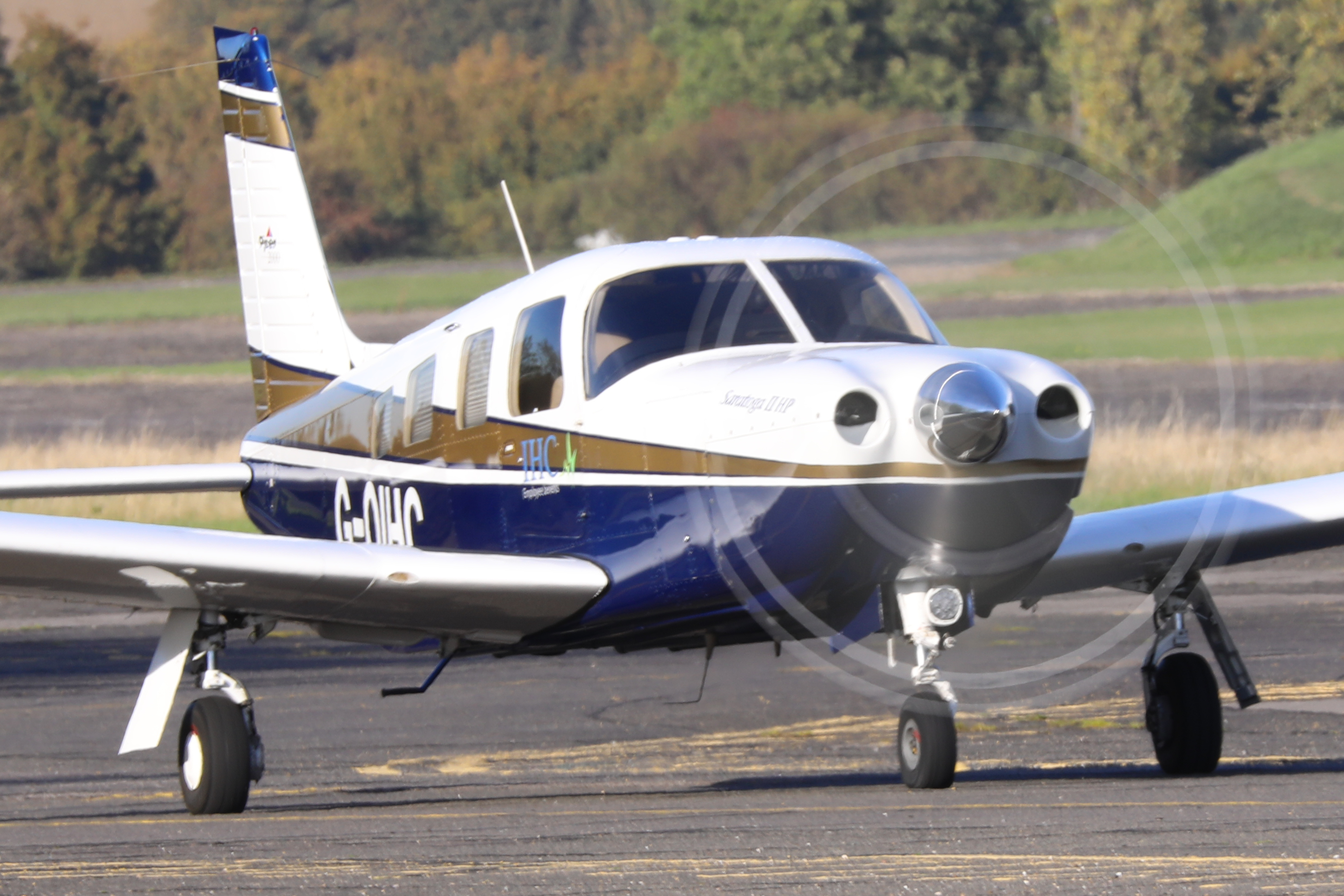 Piper PA-32R-301 Saratoga II HP G-OIHC 5D4_2239